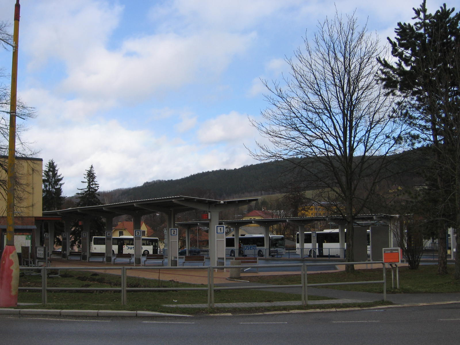 Prachatice autobusové nádraží od Nebahovské ulice